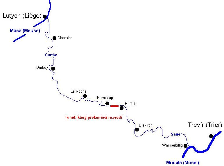 Průběh kanálu Mása-Mosela. Obrázek byl vytvořen 15. června 2008 wikipedistou Kohoutem Jelníkem z Uničova. Při tvorbě mapky byly použity různé internetové stránky.